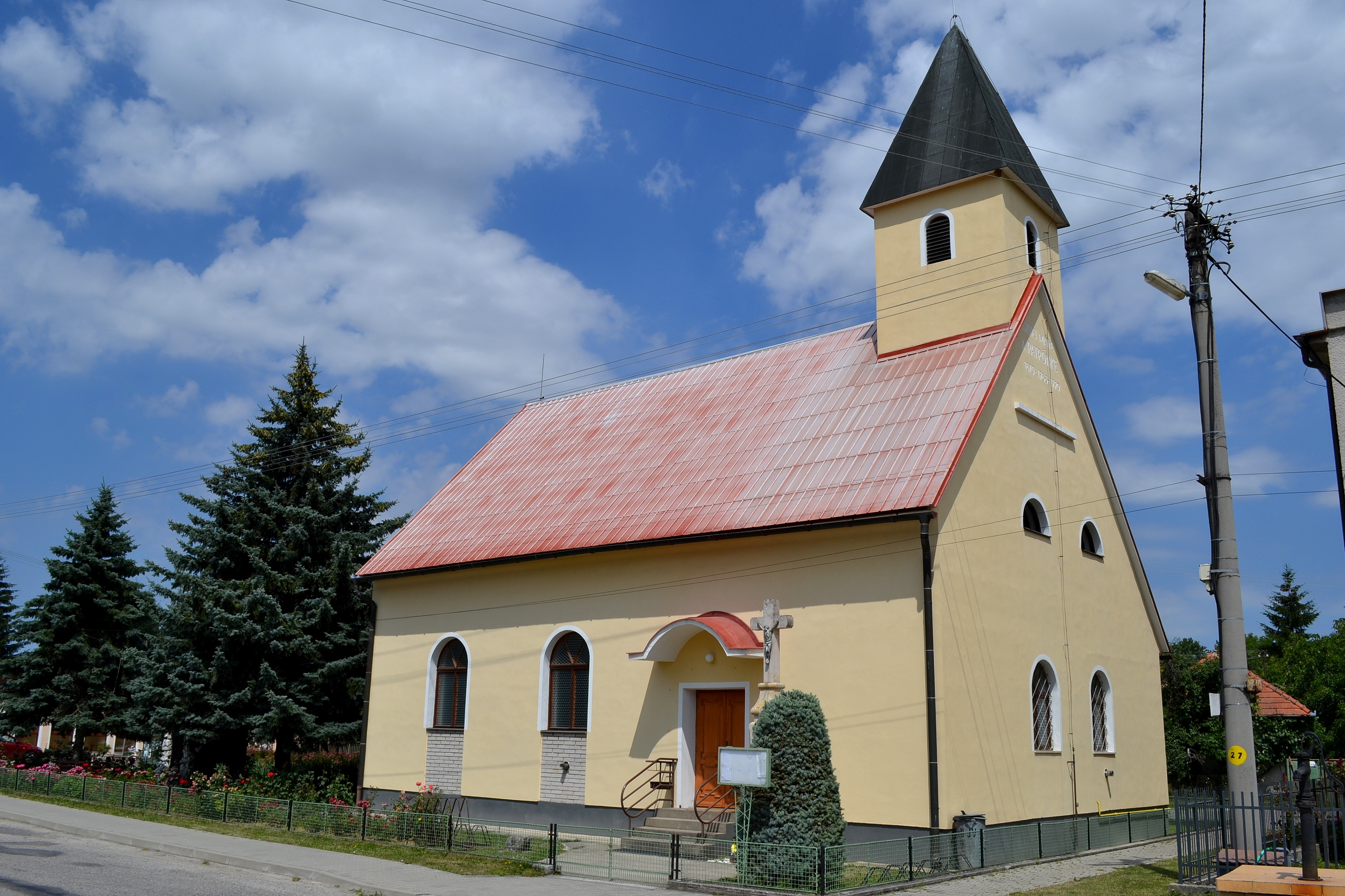 Ješkova Ves, Kostol Sedembolestnej Panny Márie; celkový pohľad